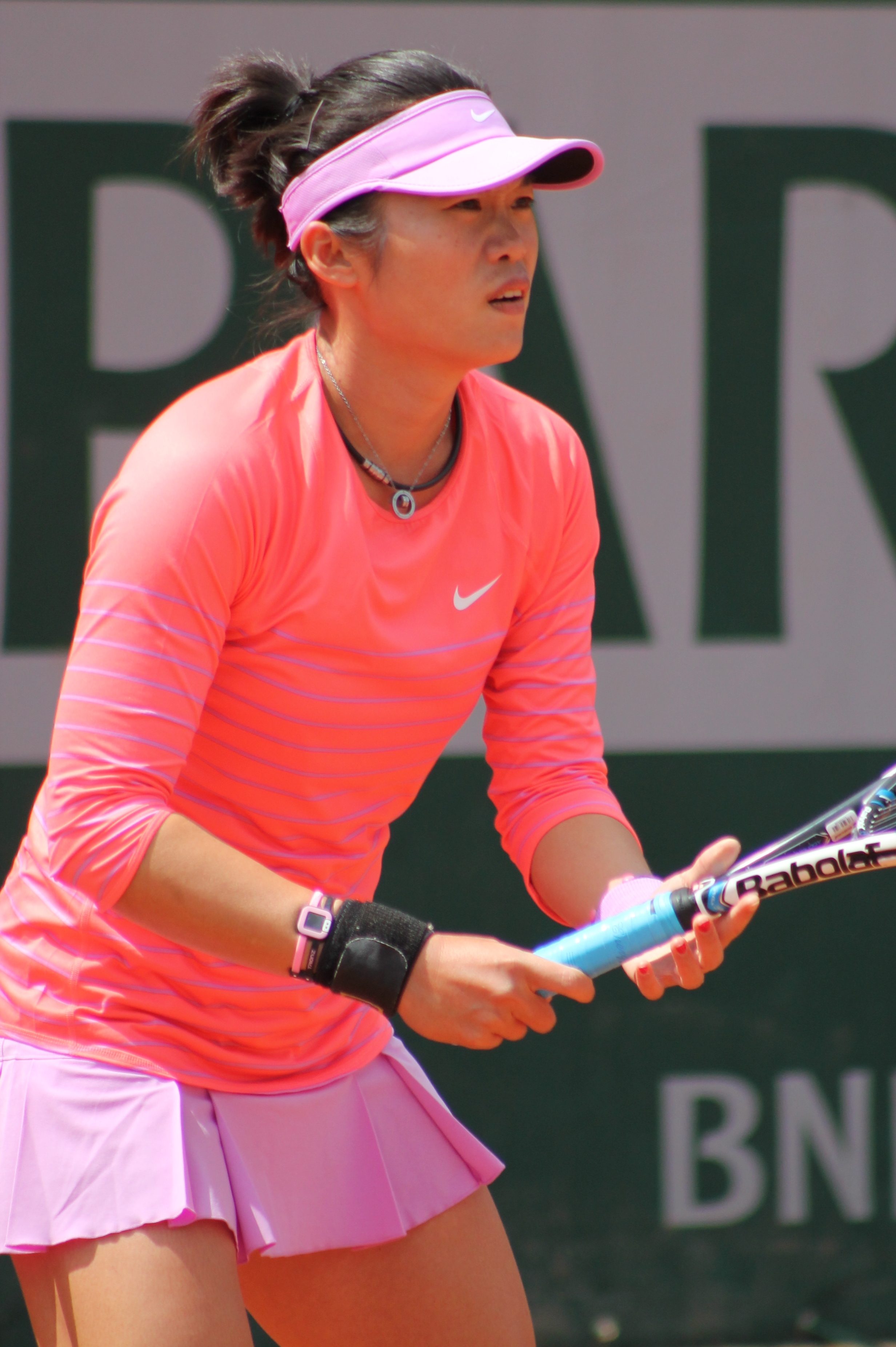 Chuang RG15